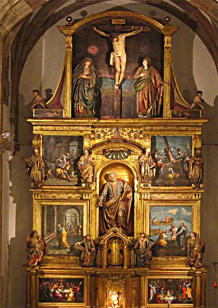 Fotografía del Altar Mayor de Santa María de Noreña